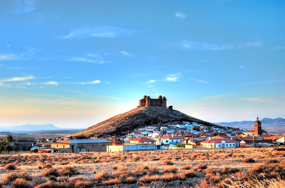 Castillo de La Calahorra